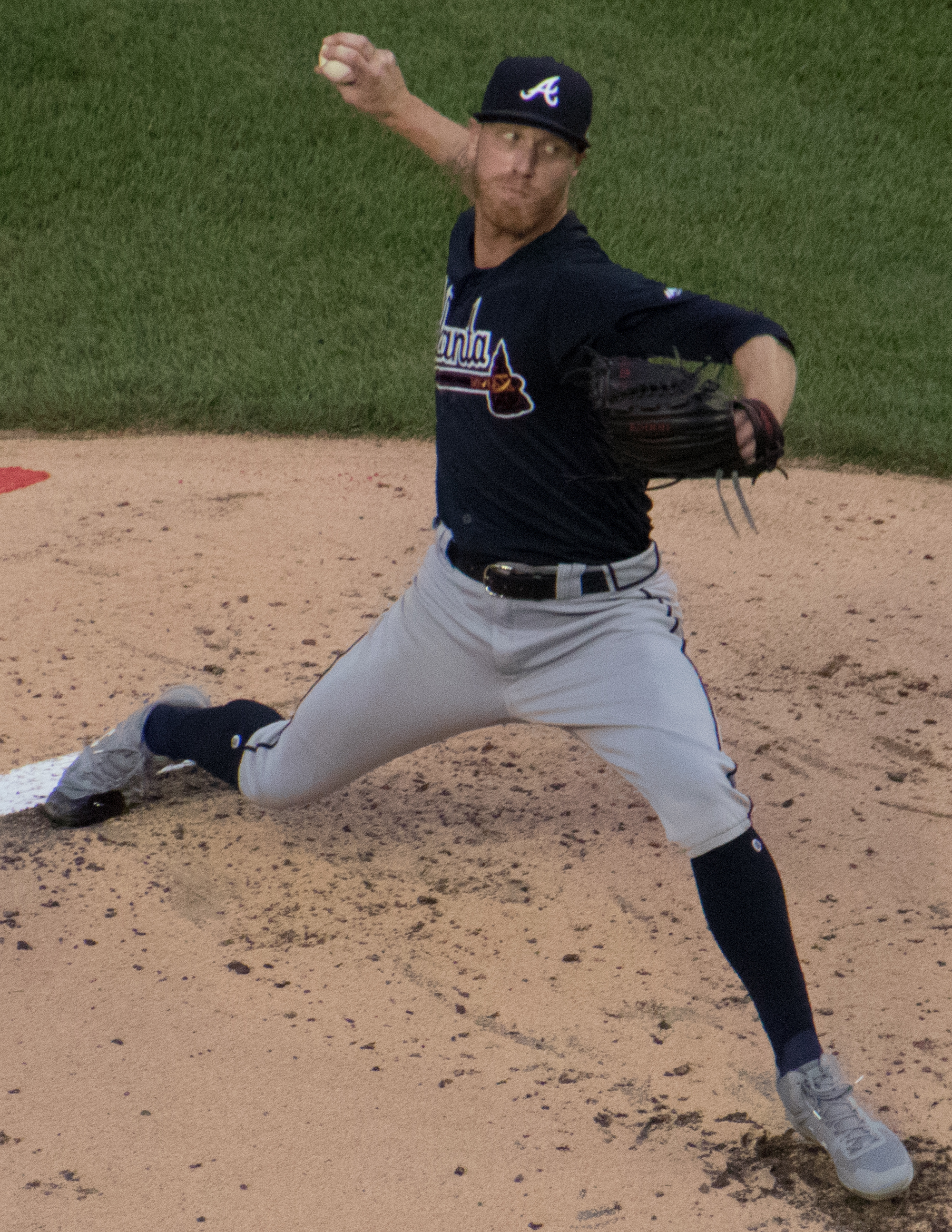 Mike Foltynewicz